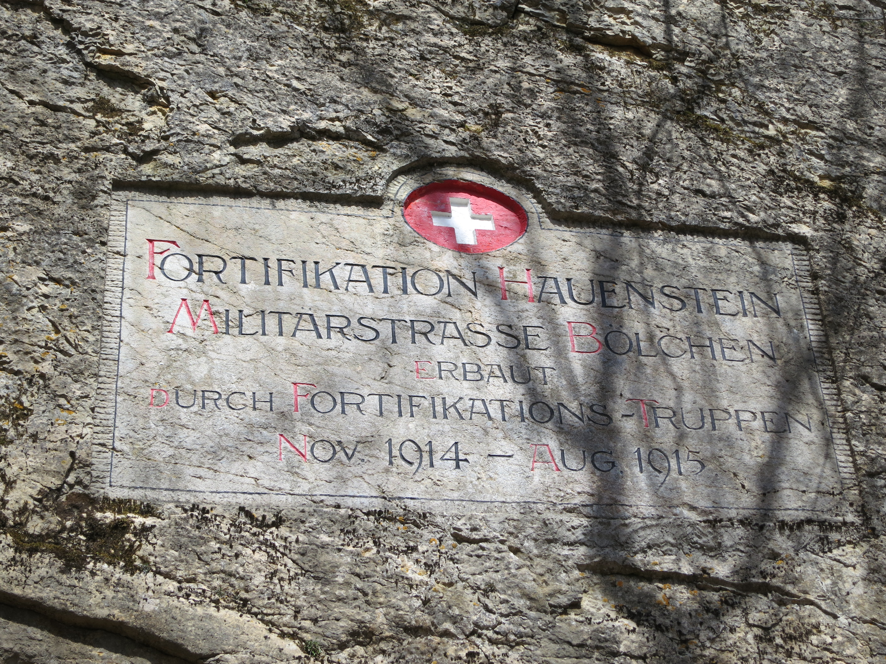 Militärstrasse Belchen Süd, Hauenstein, Schweiz